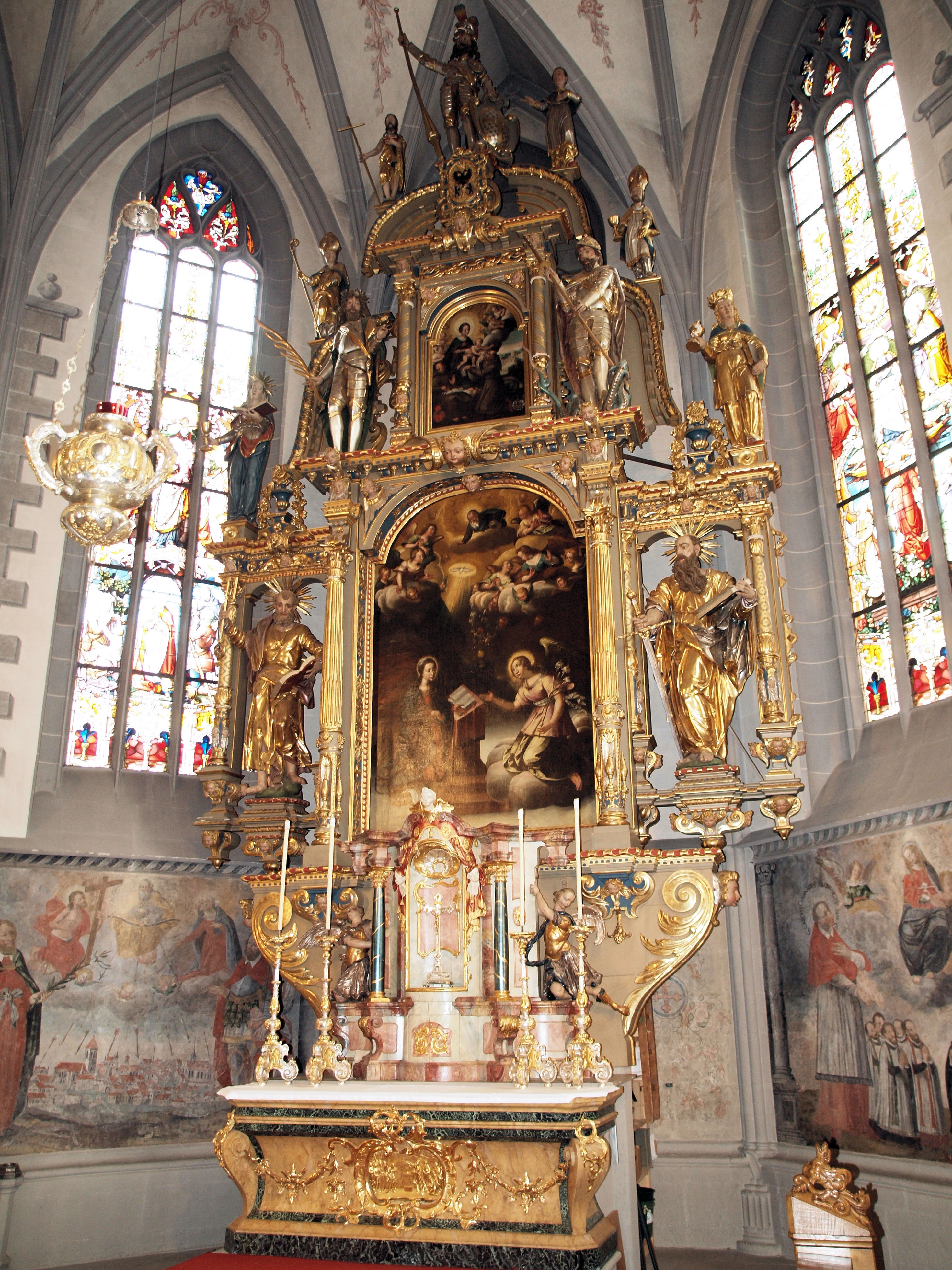 Der Hochalter der Pfarrkirche Appenzell. Der Altar endstand 1622 und ist ein Werk des Bartholomäus Cades. Der Altarunterbau wurde 1890 von der Firma Greppi mit einem neuen Unterbau versehen. Das Hauptbalt zeigt "Mariä Verkündigung" von Dietrich Meuss, das 1622 gemalt wurde